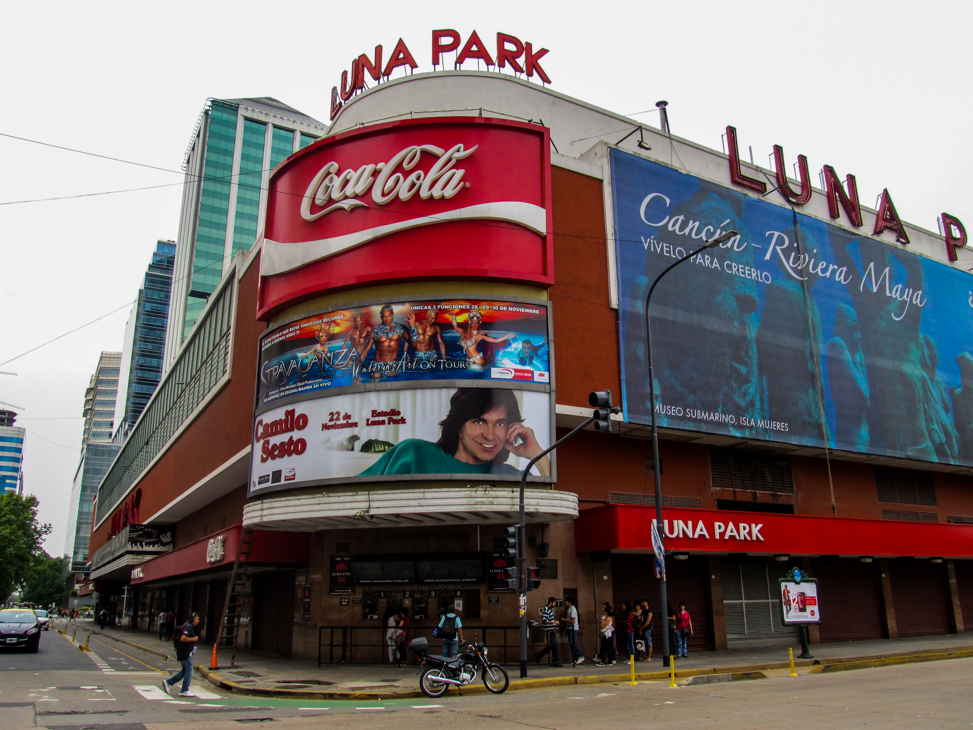 Luna Park, Buenos Aires, Argentina.